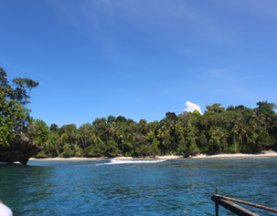 Pulau Yen Beba,Biak Timur pulau dengan keanekaragaman flora dan fauna di laut dan di pesisir pantai